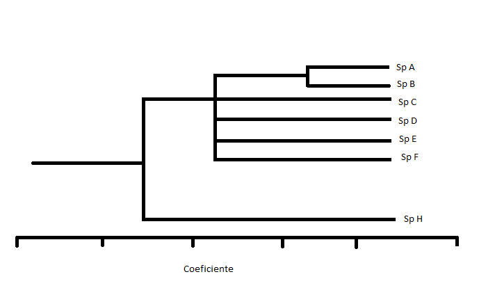 Modelo de fenograma apenas para demonstração de como seria o mesmo, dados fictícios.